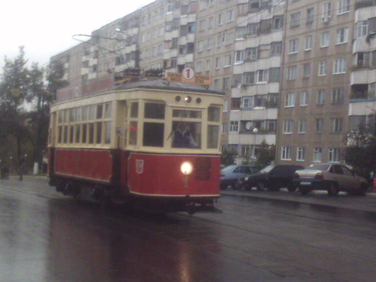 Вагон Х